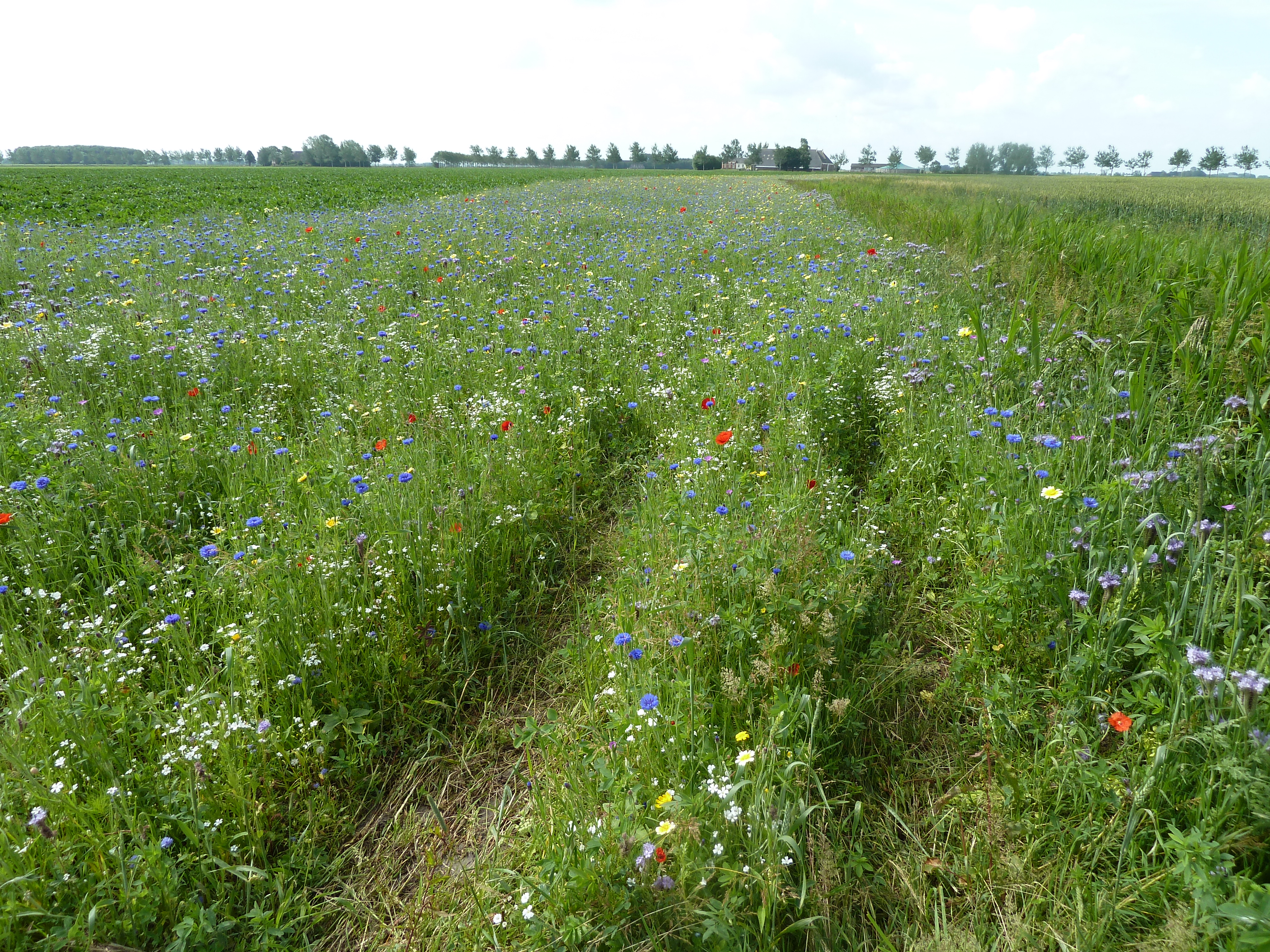 Faunarand langs een akker in de streek Kattenburg ten noorden van Zuurdijk